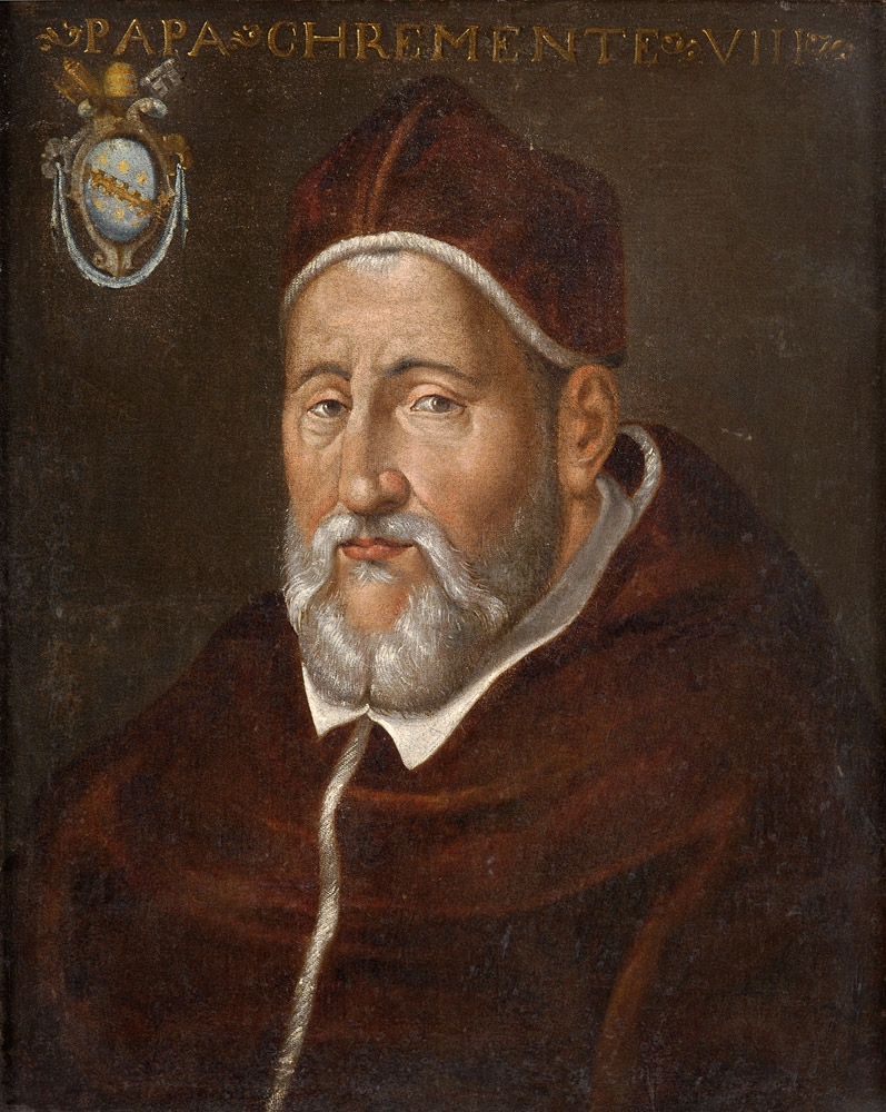 Papst Clemens VIII. Öl auf Leinwand, 65 x 52 cm